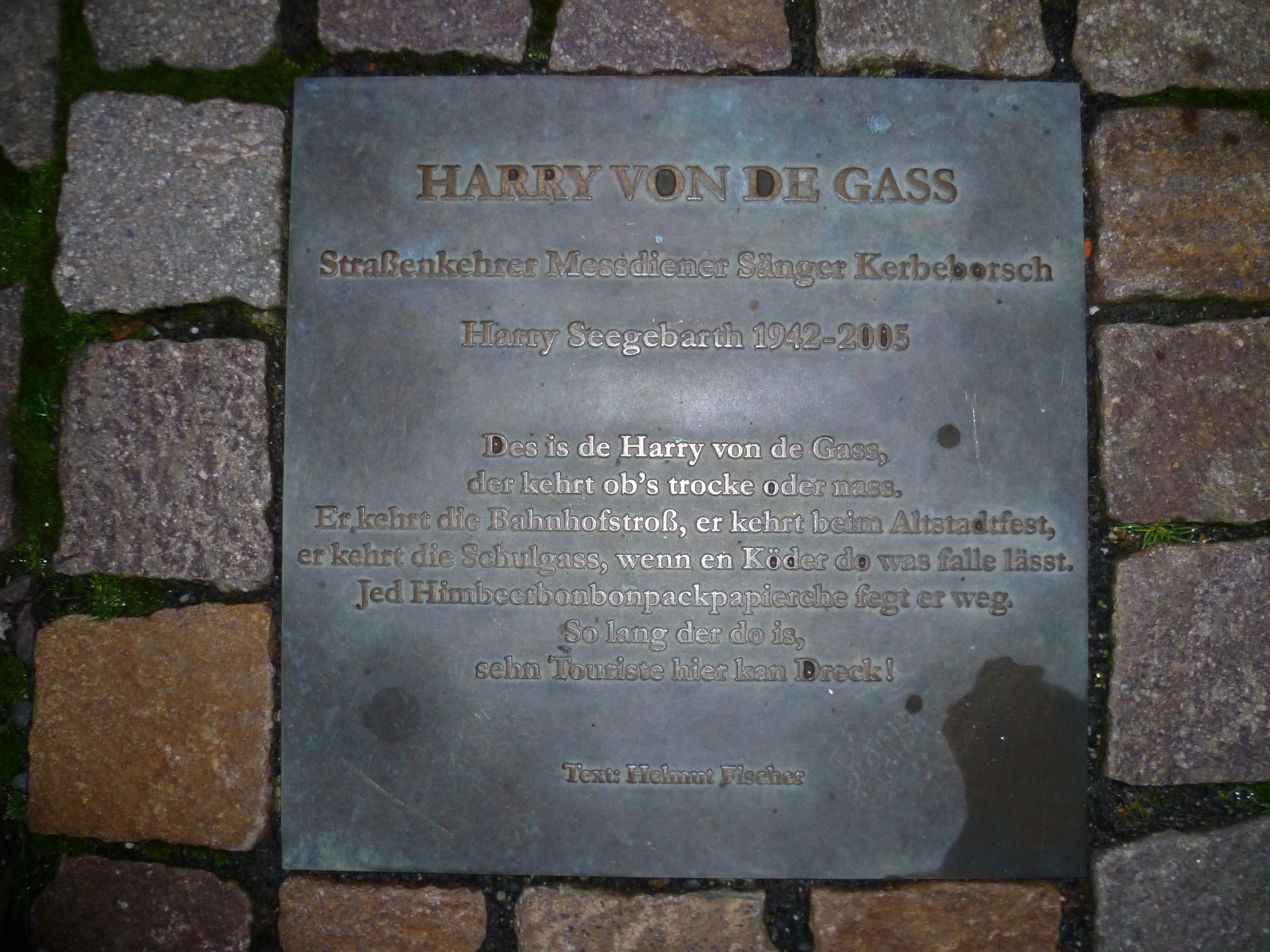 Plakette der Statue des Idsteiner Originals Harry von de Gass